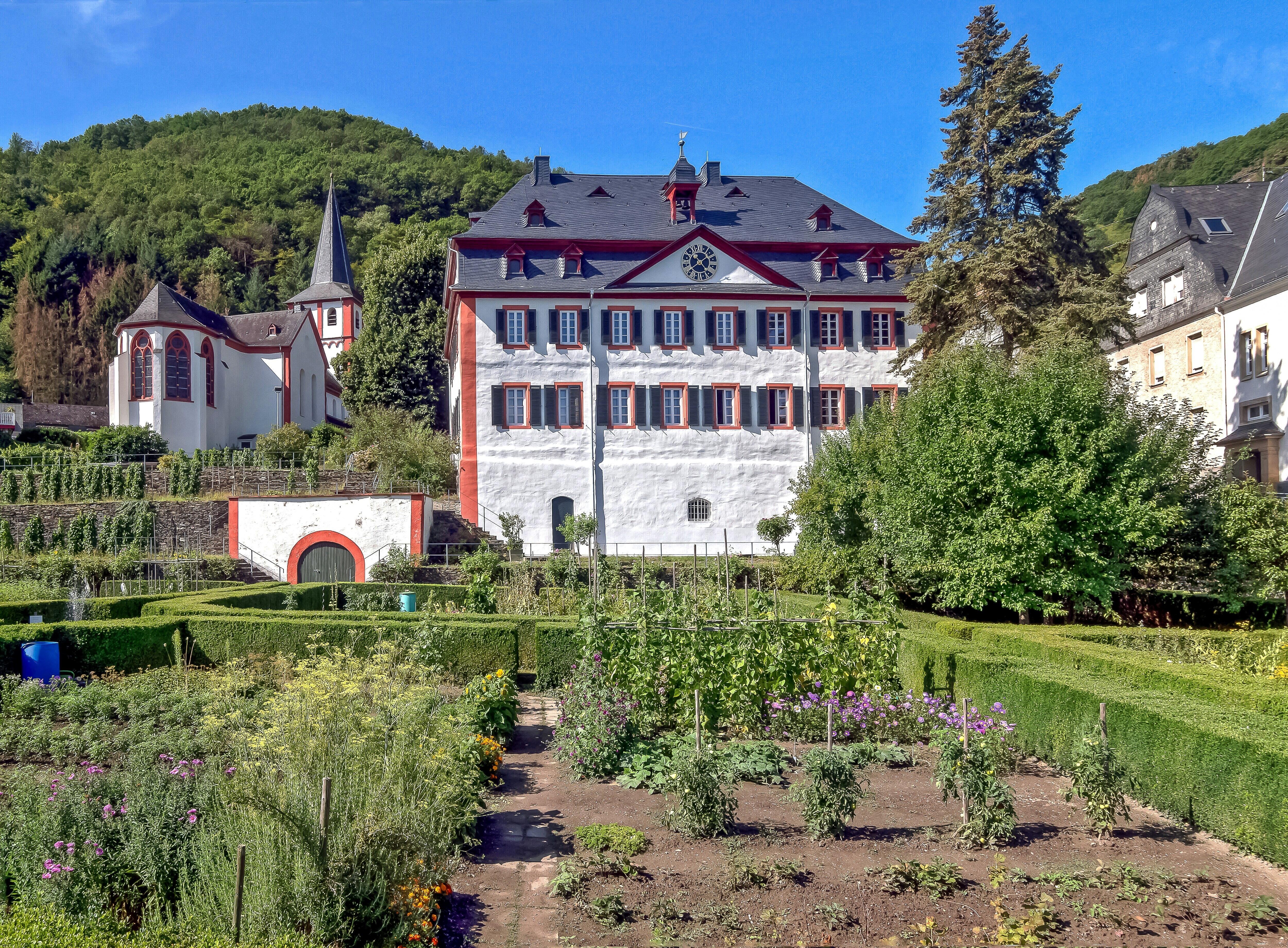 Hirzenach, Propstei, Garten und Bartholomäuskirche. Der mit Buchsbaum eingefasste Garten ist mit Obst, Gemüse und Blumen bepflanzt. Die im 19. Jahrhundert erneuerte Gartenanlage wurde bereits im Mittelalter unter den Benediktinern der Propstei angelegt und im Laufe der Zeit immer wieder umgestaltet. Die Gärten reichten vor dem Ausbau der Bahn und der Bundesstraße B9 ursprünglich bis zum Rhein.